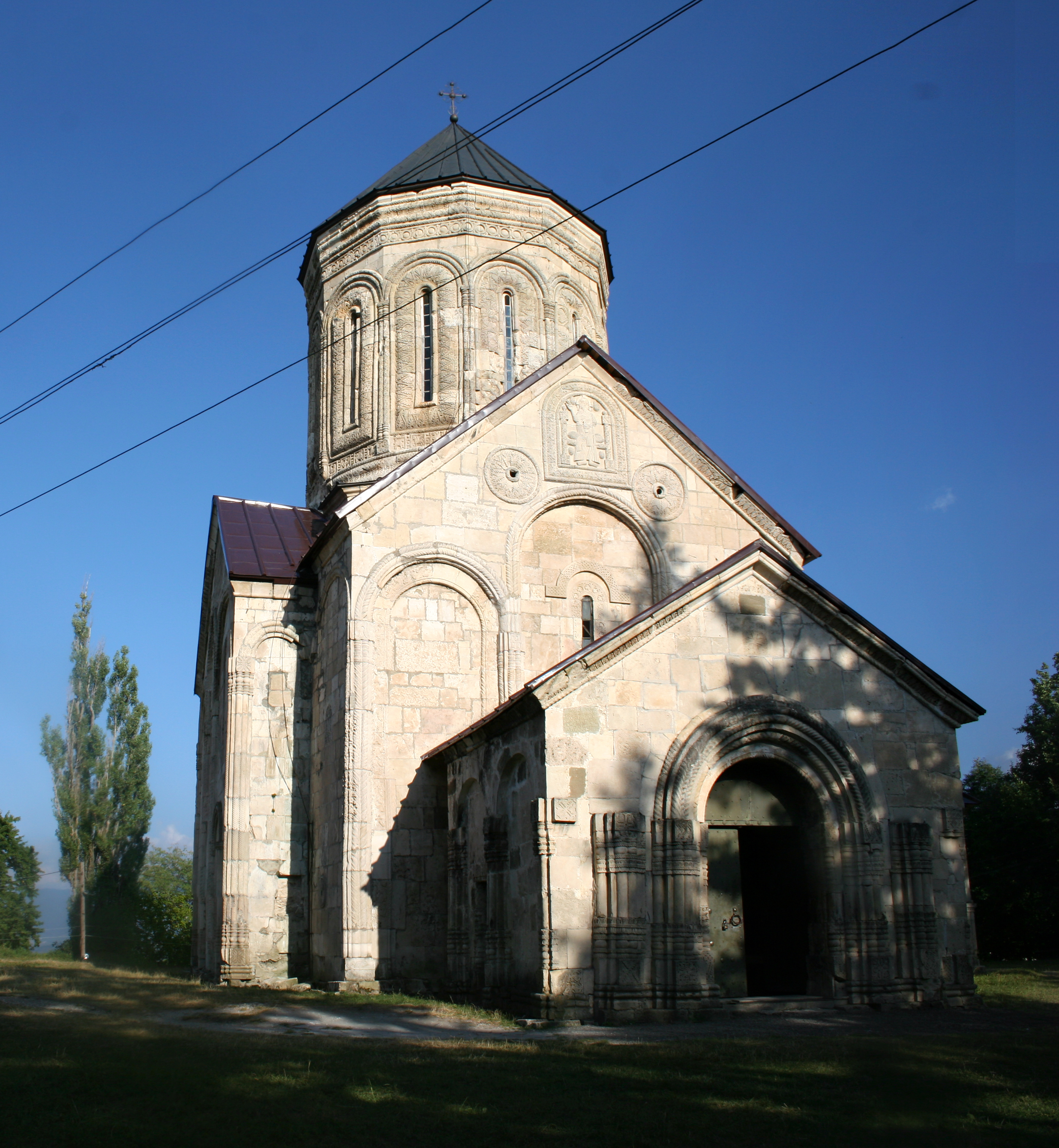 ნიკორწმინდის დასავლეთის ფასადი